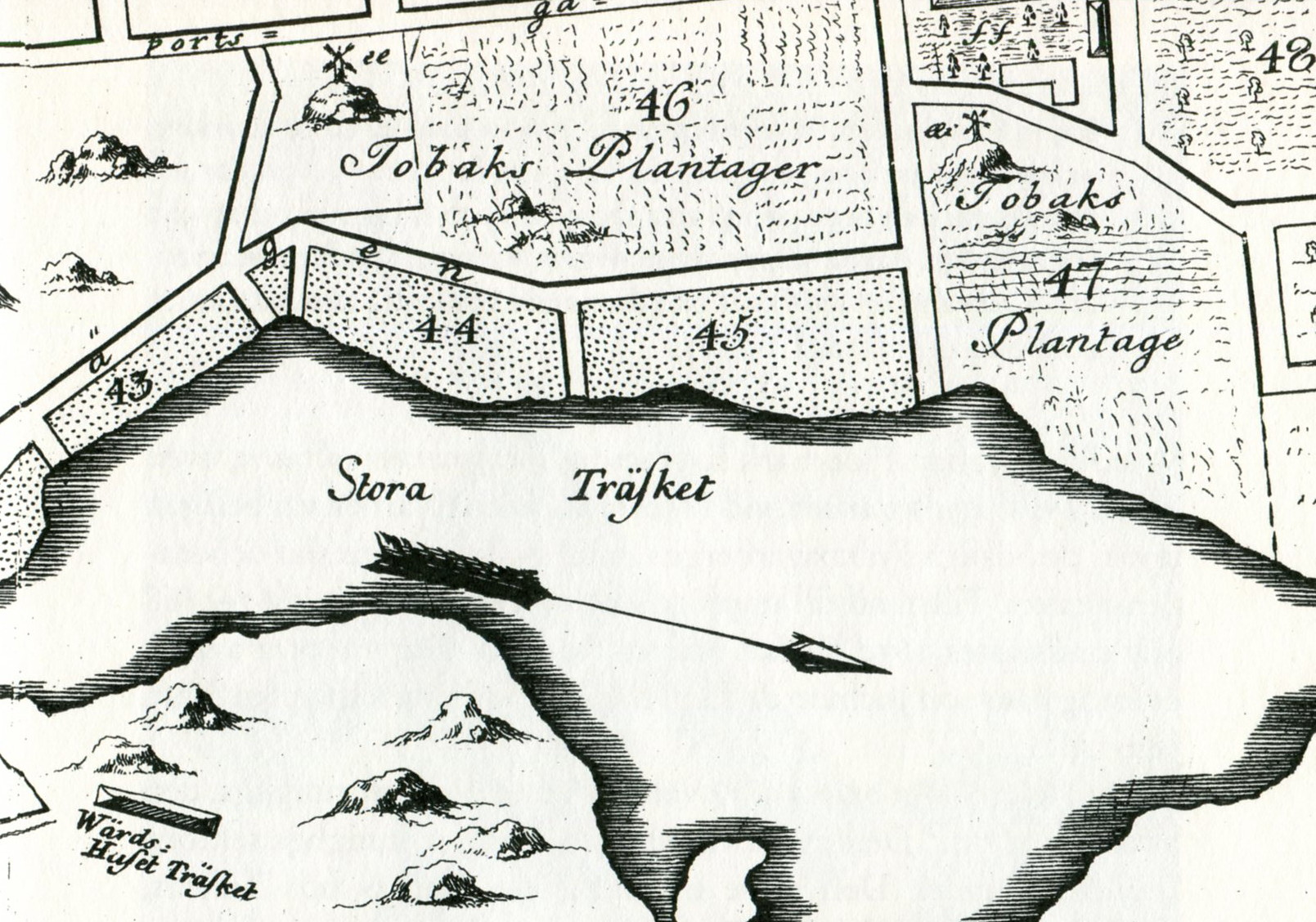 Stora Träsket 1771 med väderkvarn "Waros" (ee) och "Jan Erss" (ae)